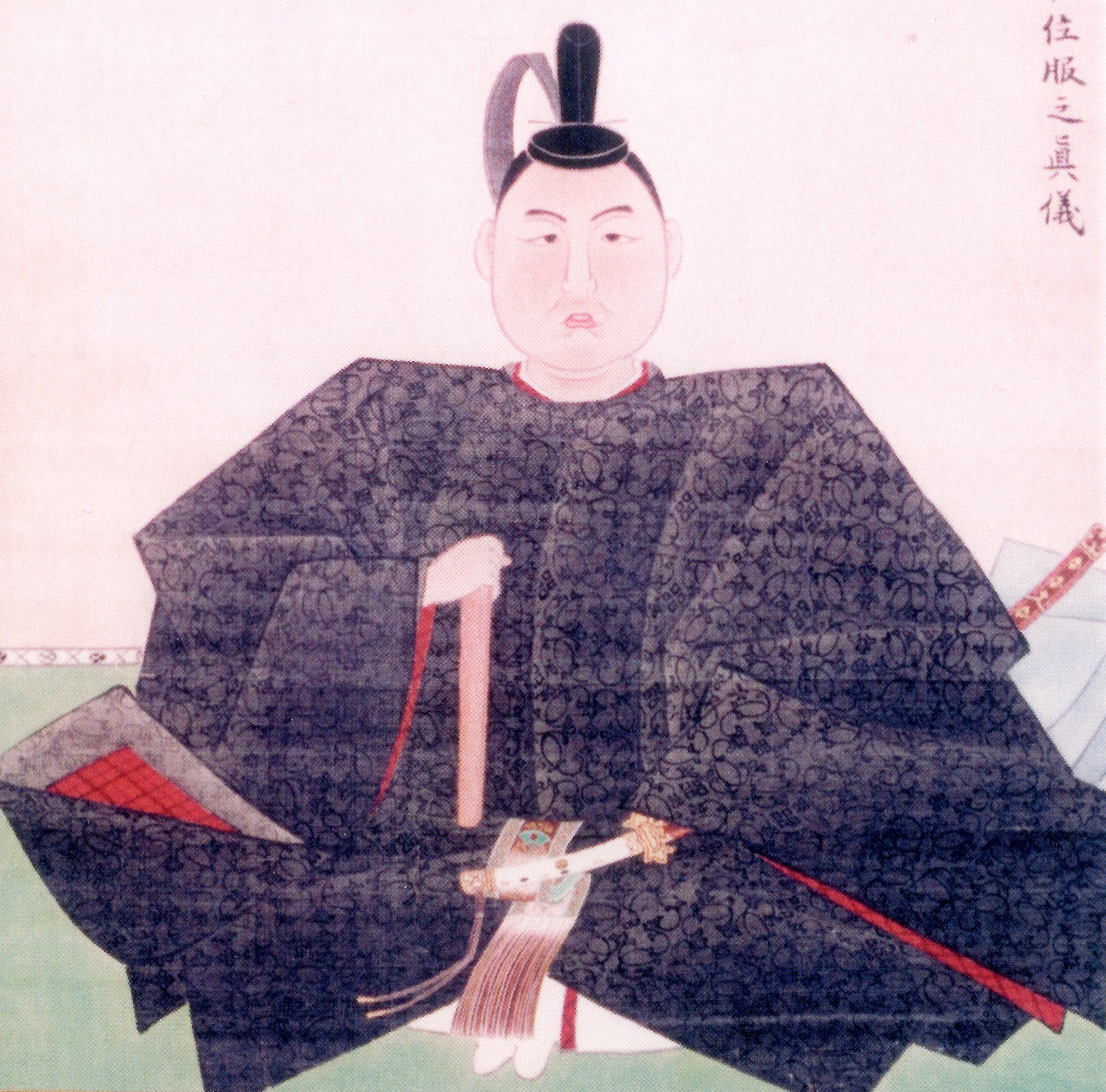 佐竹義格の肖像。